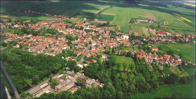 Tuto fotku jsem získal,když jsem byl v letadle